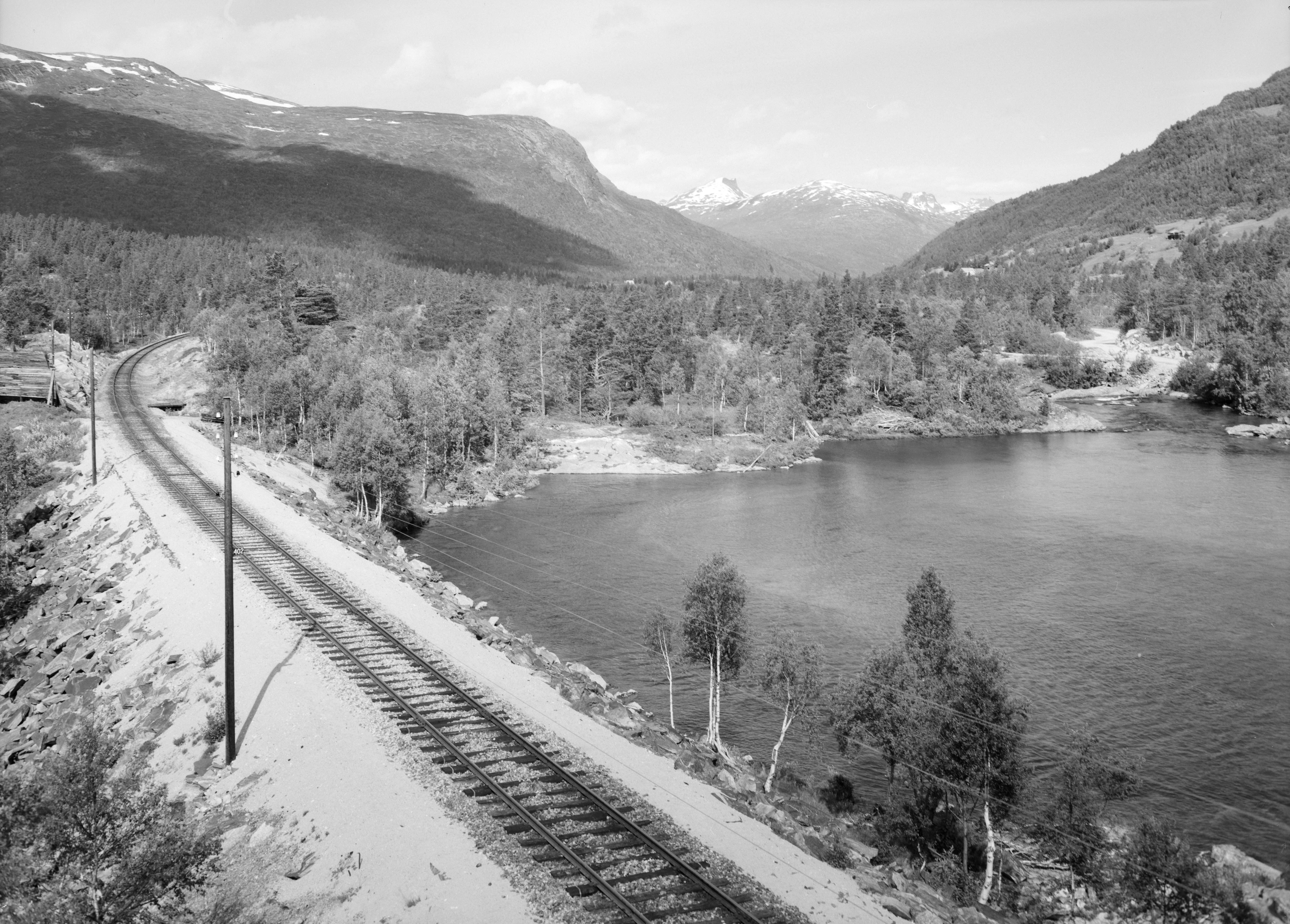 Bjorli med Døntind. Bildet er hentet fra Nasjonalbibliotekets bildesamling. Bjorli, Romsdalen, Lesja, Oppland